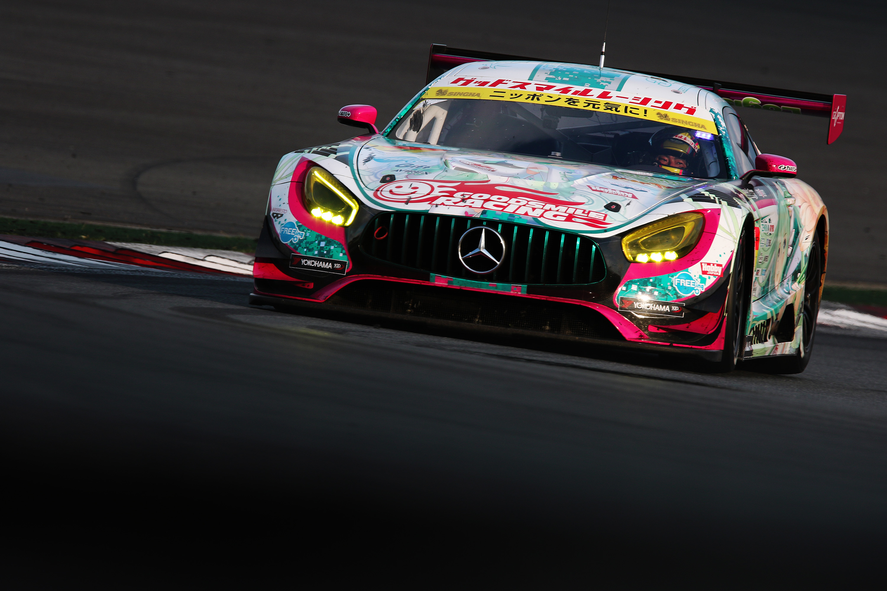 2017.5.4 SUPER GT Rd.3 Fuji Speedway GOODSMILE RACING & TeamUKYO 4 グッドスマイル 初音ミク AMG [7D2_6366ks]